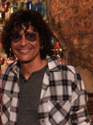 Luiz César Pereira Caldas (Feira de Santana, 19 de janeiro de 1963 ) é um multi-instrumentista, arranjador, produtor, compositor e cantor brasileiro conhecido como "O Pai do Axé Music", por ter criado o gênero musical que criou um novo movimento no circuito baiano na década de 80.